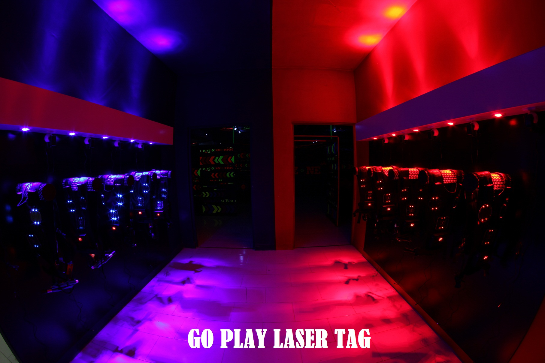 اسلحه خانه